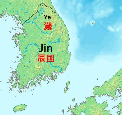 한반도의 남쪽의 나라